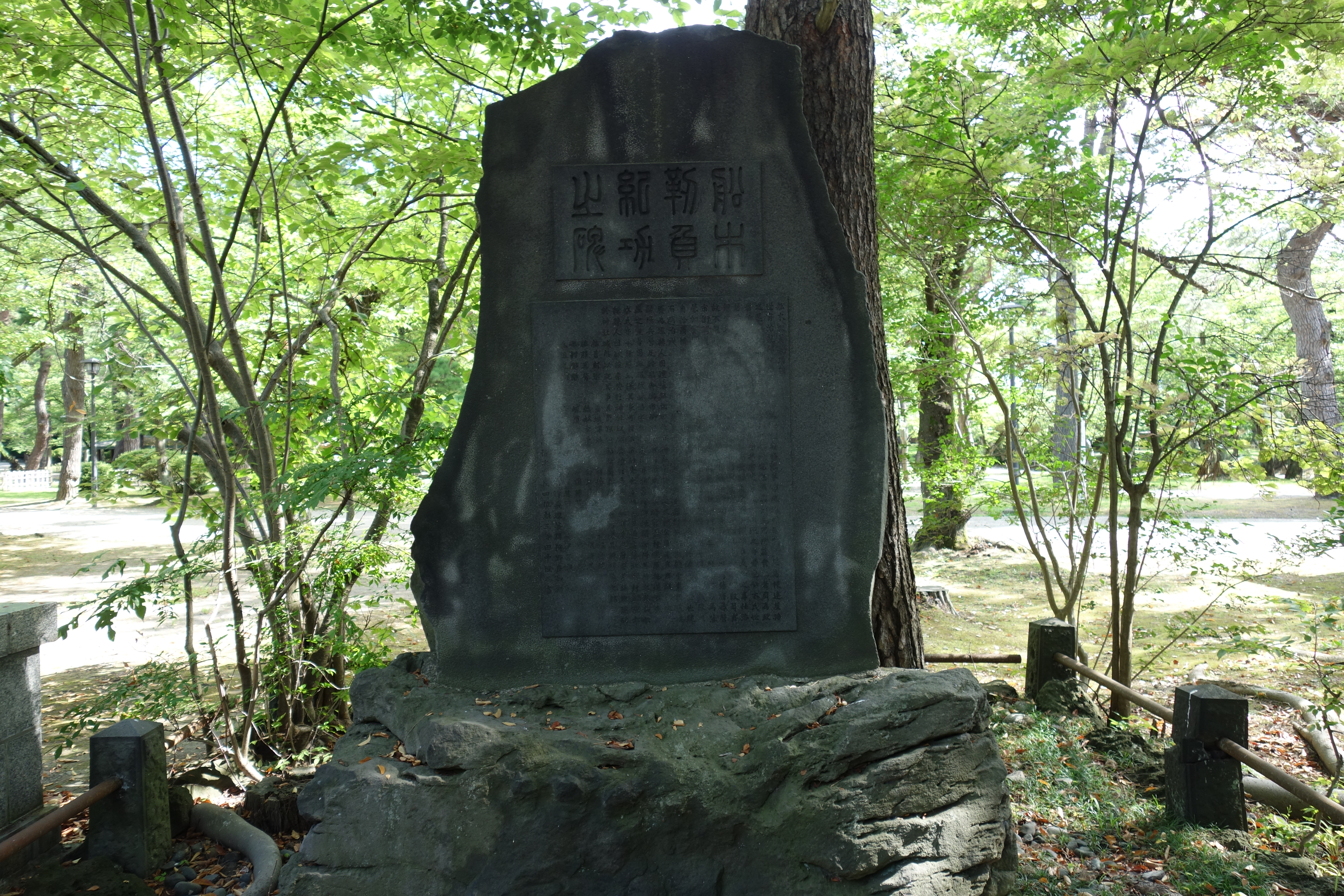 秋田県千秋公園にある船木靱負紀功之碑